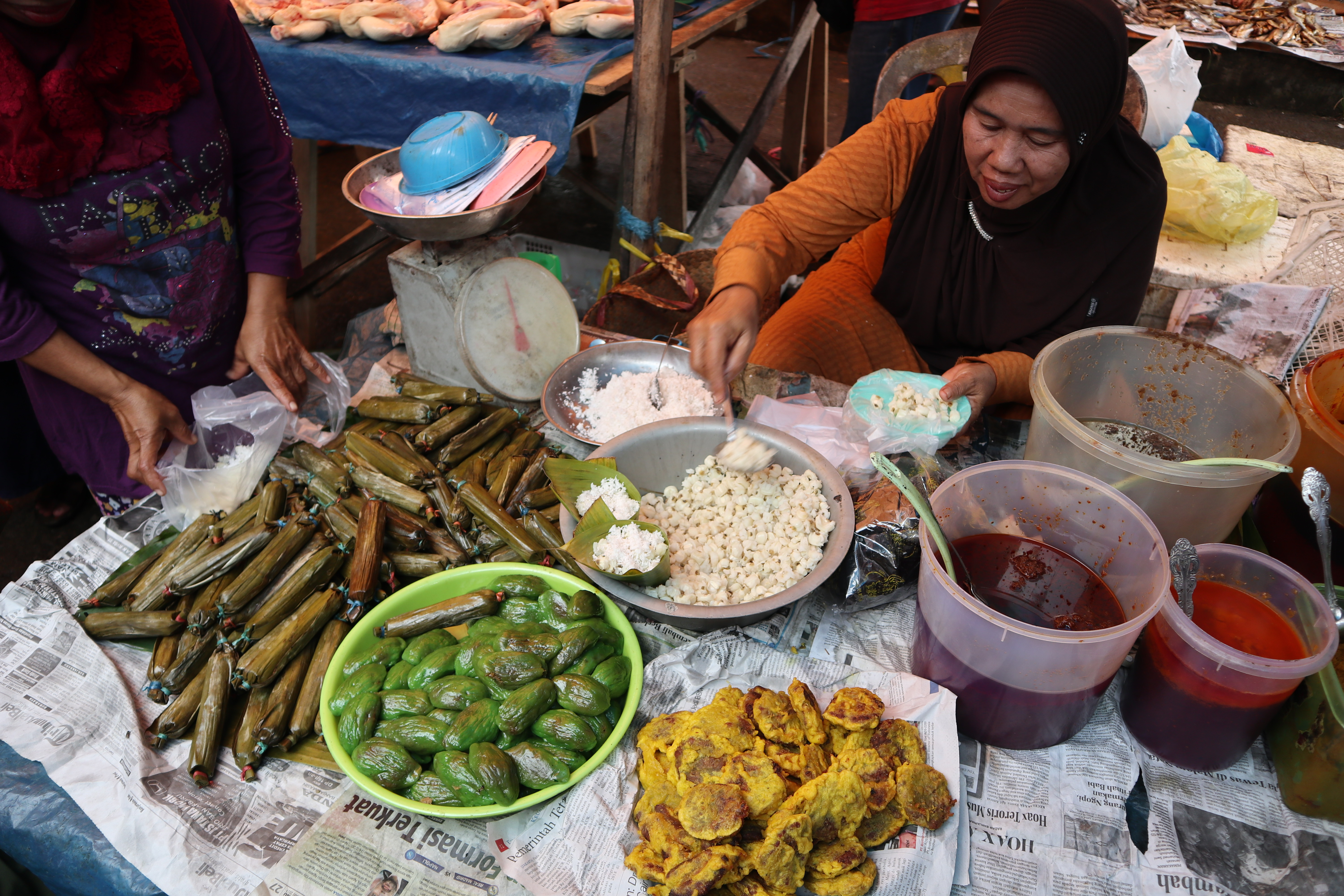 Penjual jajanan tradisional Banjar di Pasar Halong setiap hari Sabtu.